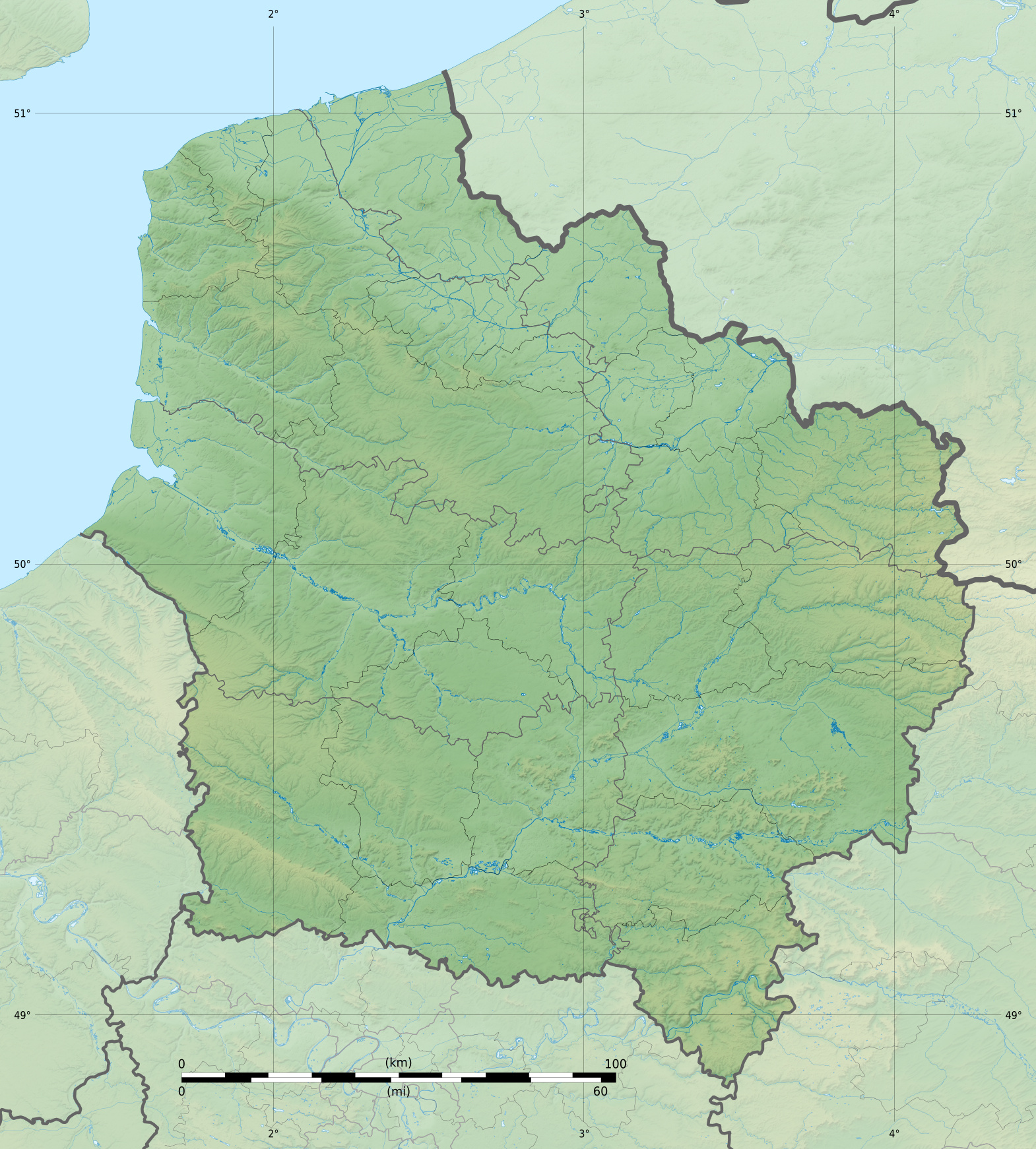 Carte topographique vierge de la région Hauts-de-France, France, destinée à la géolocalisation. Projection "Géoportail" (projection équirectangulaire à la latitude de référence 46.5° Nord) Limites géogrpahiques de la carte : West: 1.12 E East: 4.455 E North: 51.251 N South: 48.702 N